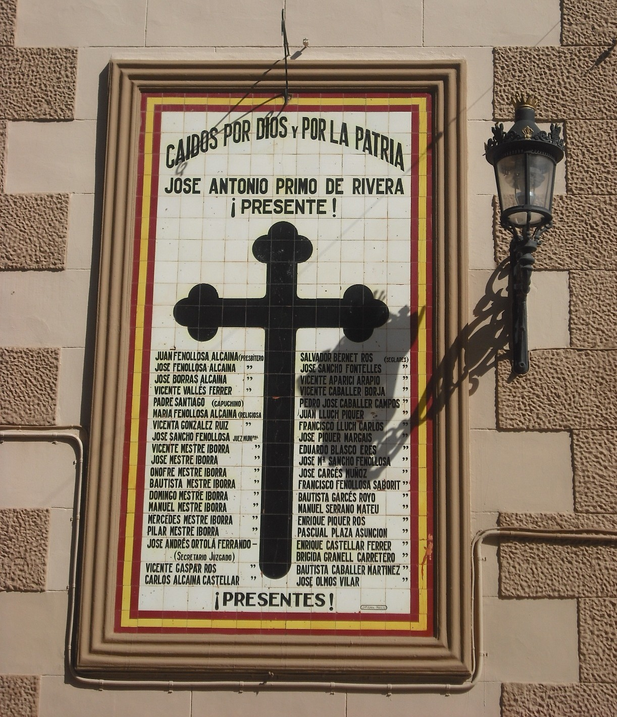 Placa dels caiguts a l'església de Sant Antoni.